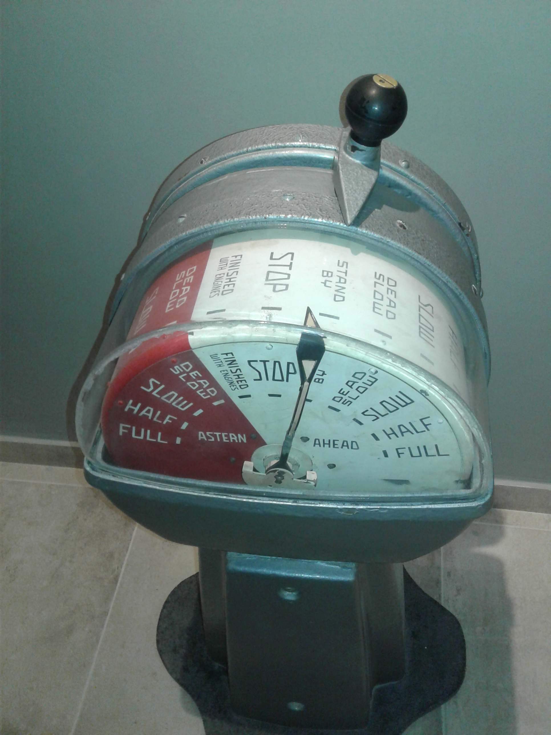 Elemento utilizado para comunicar de un puente del buque a otro las velocidades deseadas. Utilizado en buques petroleros. Elemento exhibido en el Museo Nacional del Petroleo Museo Nacional del petroleo